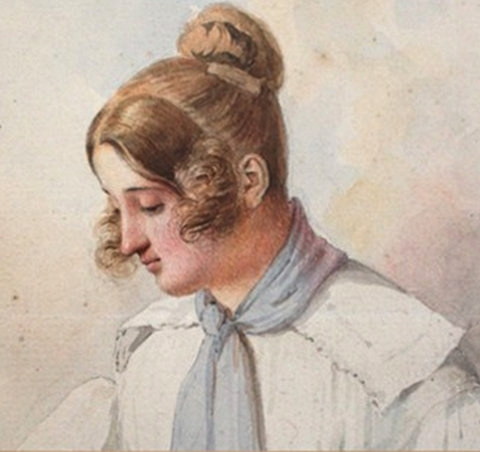 Lydie Wilson de Ricard (1850-1880) (détail) aquarelle par sa sœur Jeanne (1852-1877). Collection privée.